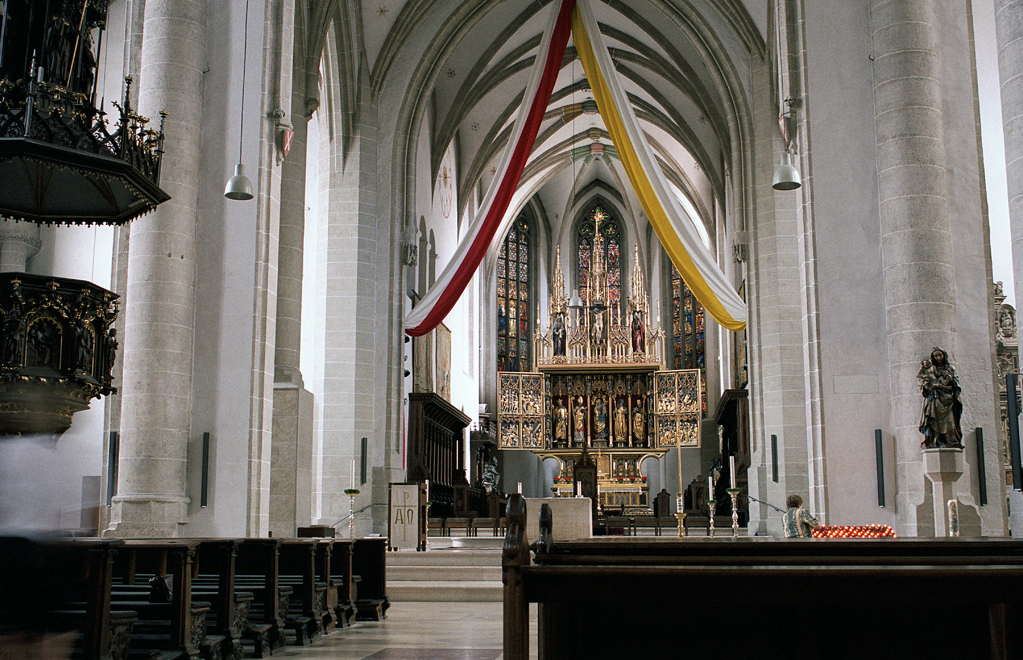 Eichstätter Dom, Innenraum